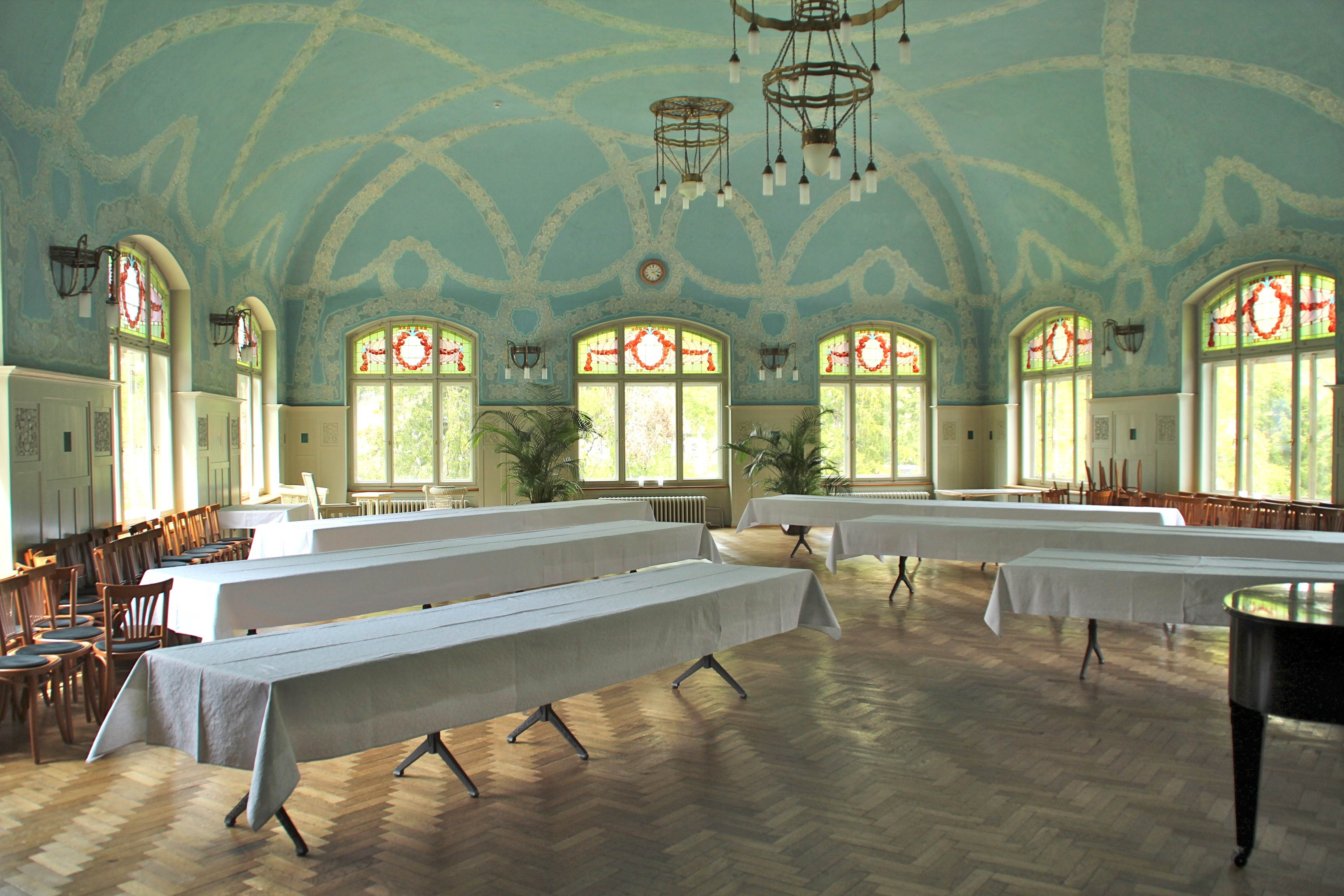 Kurhaus Bergün Saal